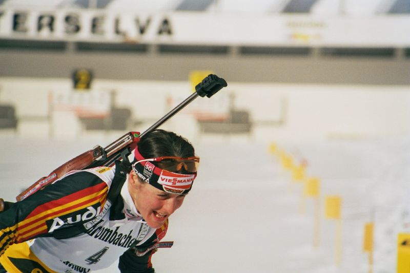 nach dem Schiessen: Uschi Diesl